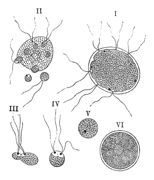 Entwicklung von Pandorina I – schwärmende Familie II – geschlechtliche Familie, von welcher einzelne Zellen aus der Hülle austreten III – zwei sich paarende Schwärmer IV – dieselben nach ihrer Vereinigung V – eben entstandene Z. VI – ausgewachsene Zygospore